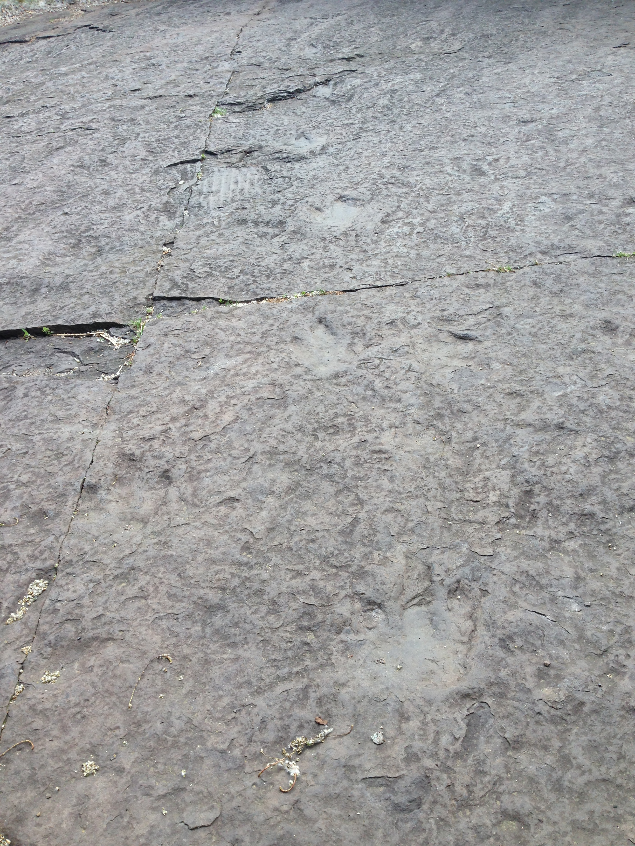 Dinosaur footprints